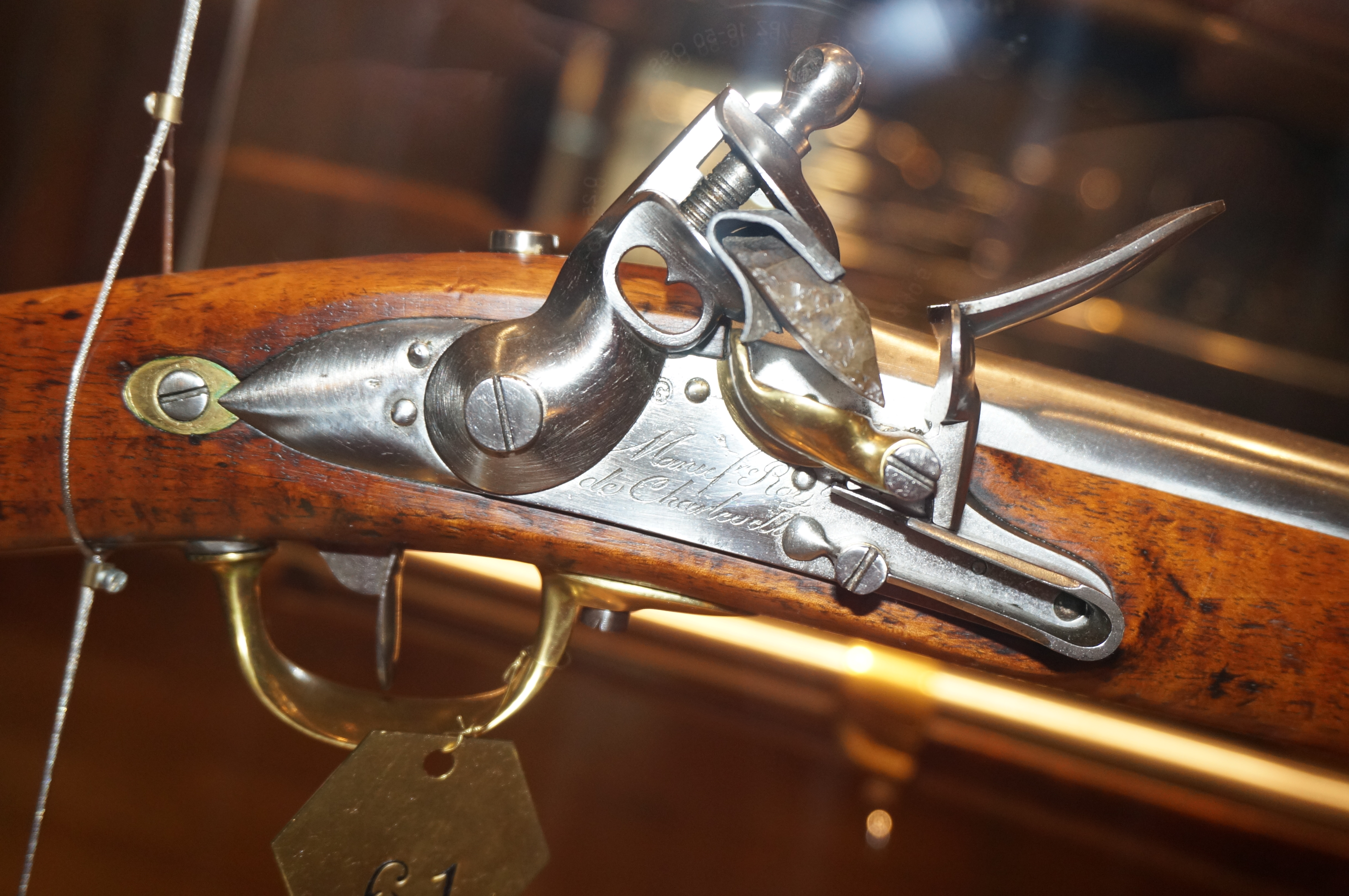 Mousqueton_de_cavalerie_modèle_1822, détail, Présenté au Musée de l'Ardenne .